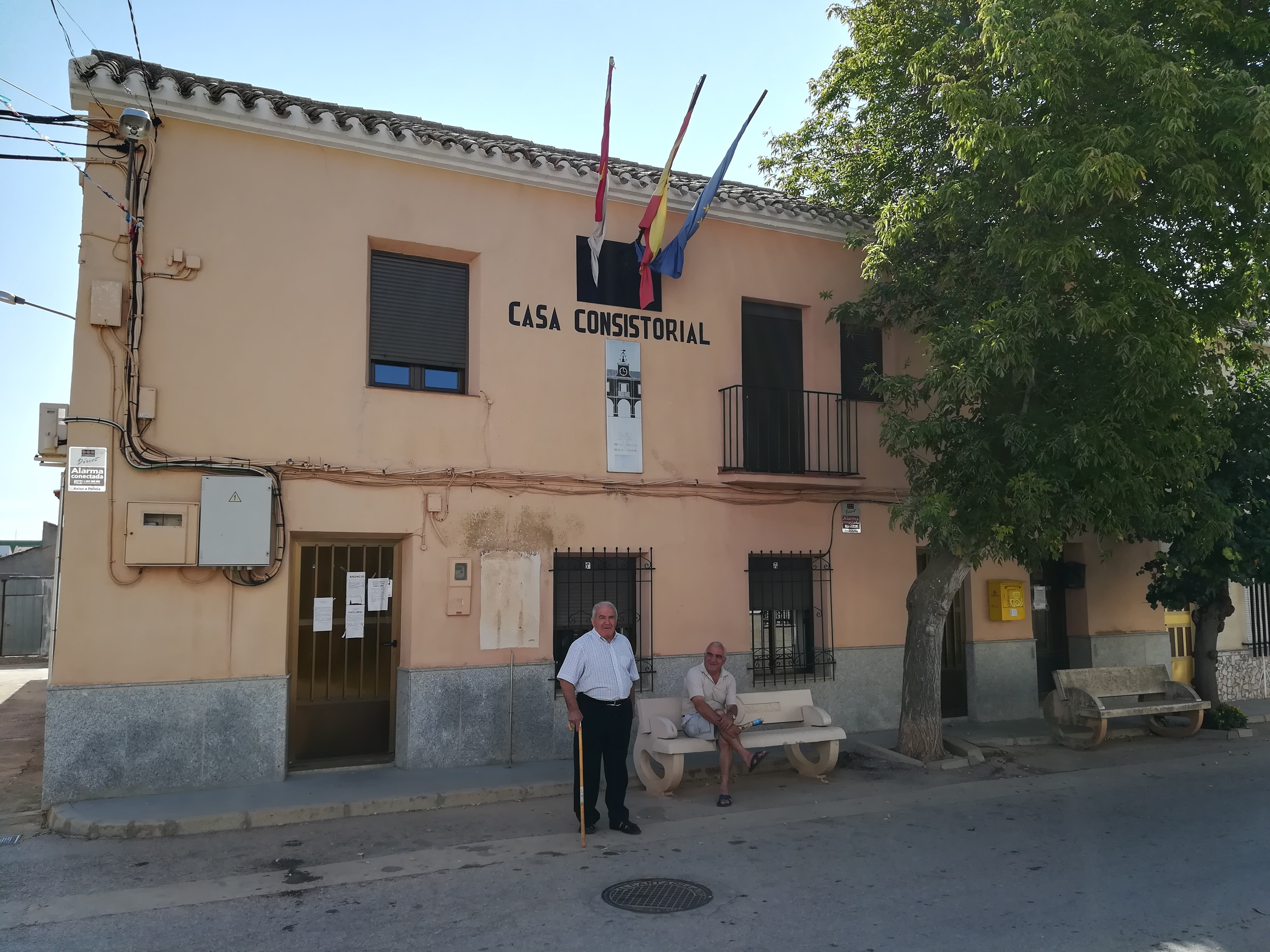 Vista del Ayuntamiento de Casas de Guijarro, Cuenca.